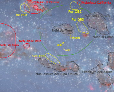 immagine del Braccio Locale, con in evidenza in verde l'antica superbolla che avrebbe dato origine alle associazioni OB attorno al Sole